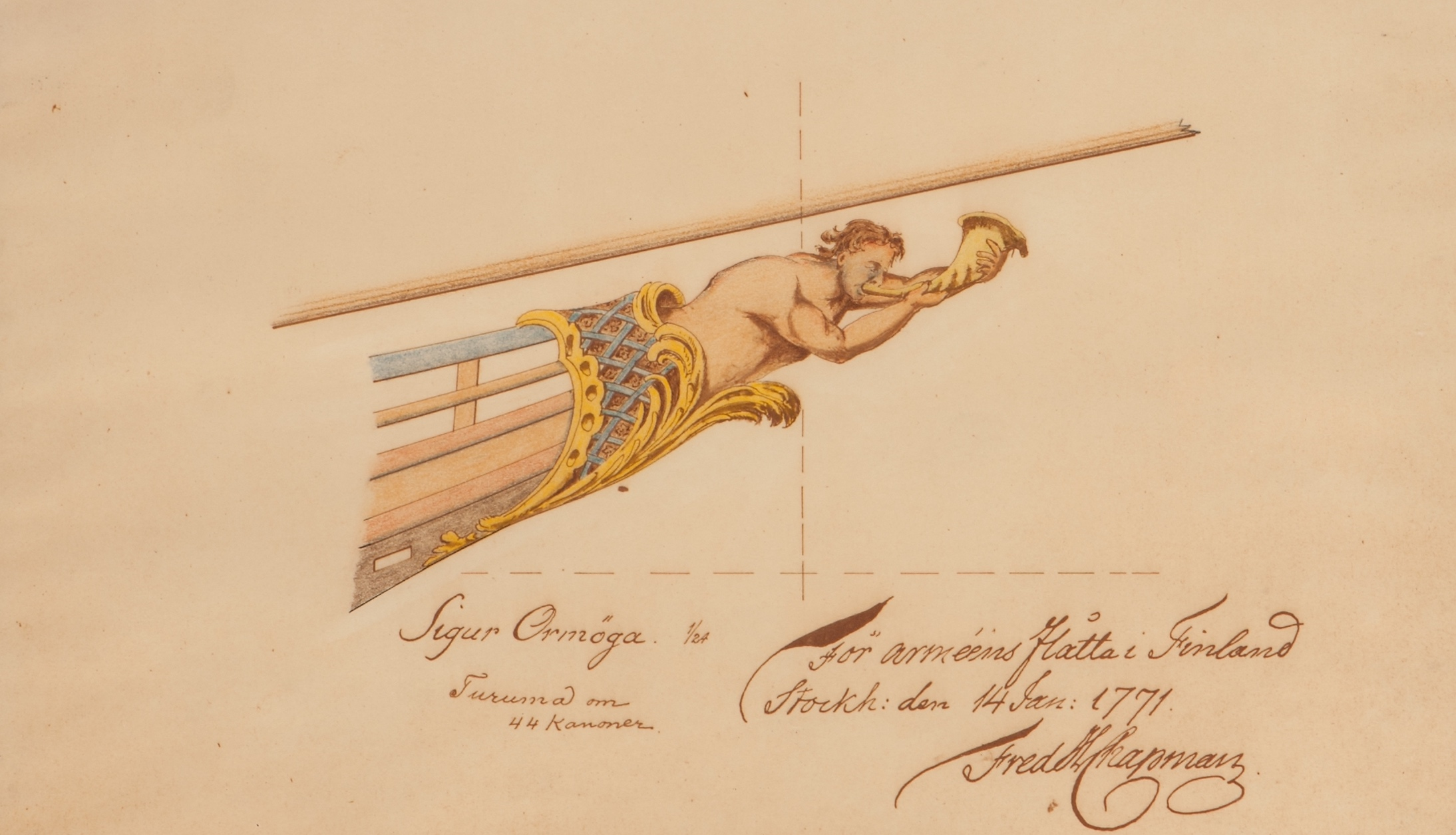 Ritning av galjon till fartyget Sigurd Omröga i Arméns flotta. Målning från 1771.